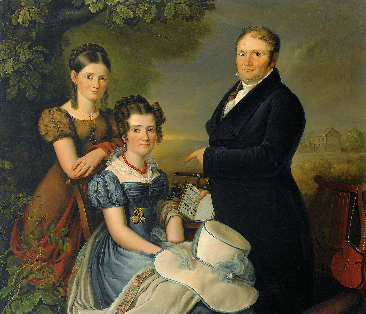 Jean Gerard Vonderbank mit seiner Frau Catherina (geb. Parisis) und ihrer Tochter Josephine. Der Vater Jean Gerard Vonderbank hält sein 1824 veröffentlichtes Buch „Das gleichseitige Dreieck als Curvenzieher Geodolit“ in der Hand